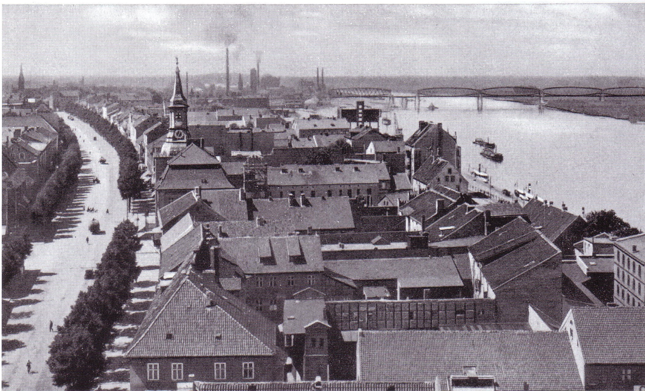 Fotografie von Tilsit und der Memel